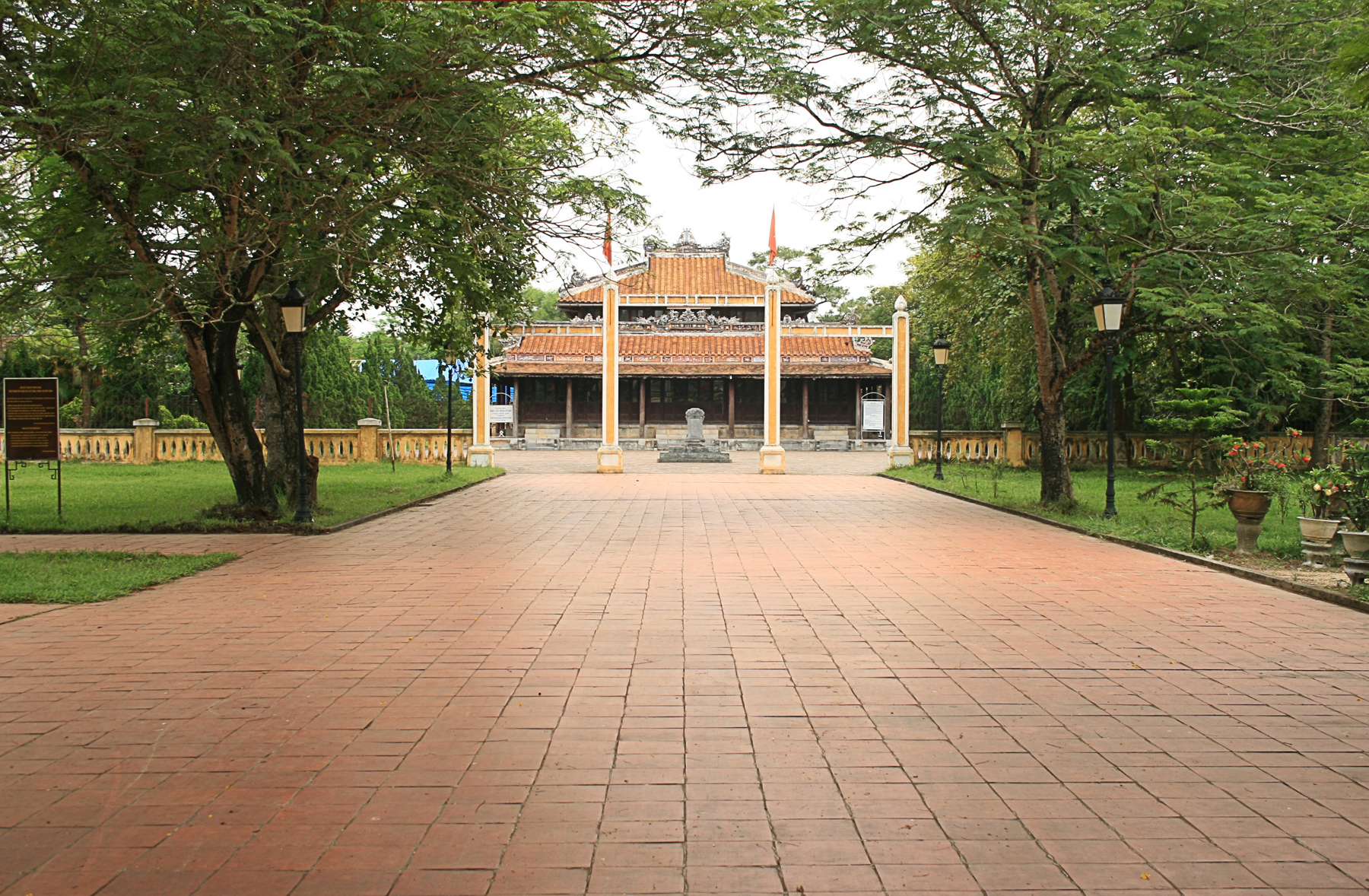 Thể loại:Di tích cố đô Huế Thể loại:Thần kinh nhị thập cảnh Thể loại:Hình truyền lên bởi thành viên Lưu Ly